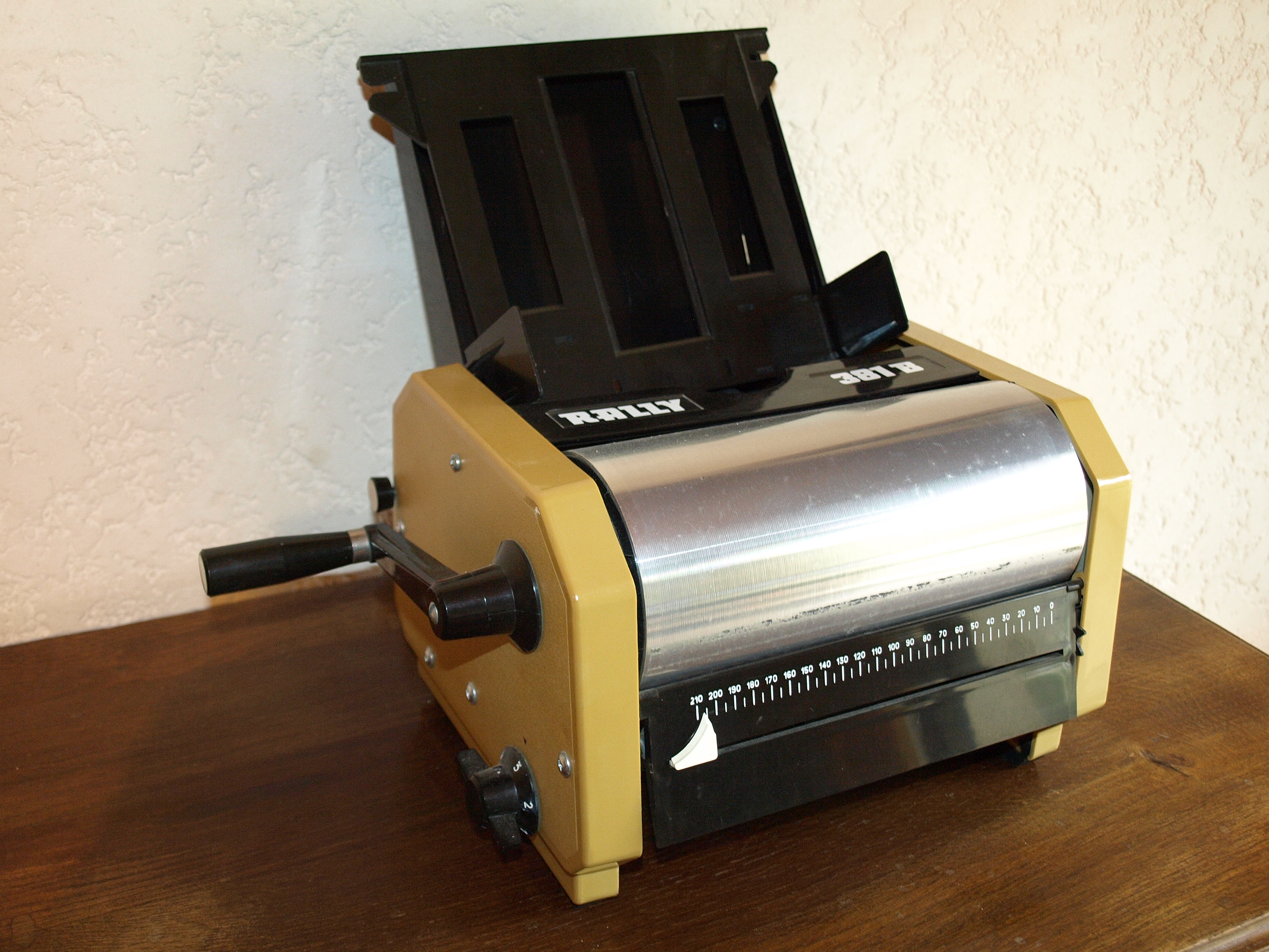 Machine à polycopier à alcool mécanique.